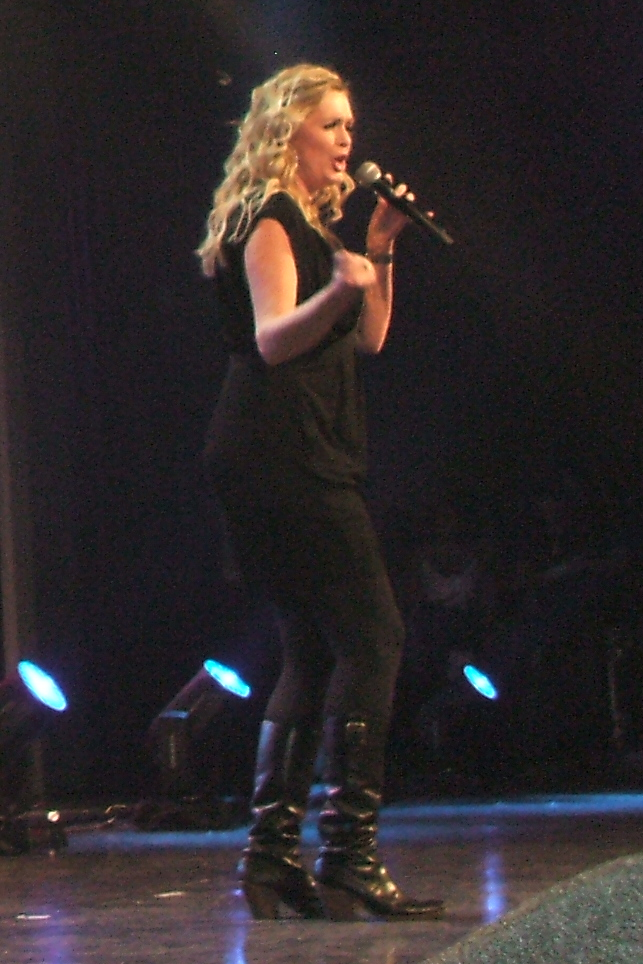 Pauzenummer tijdens het Nationaal Songfestival 2011 Esther Hart